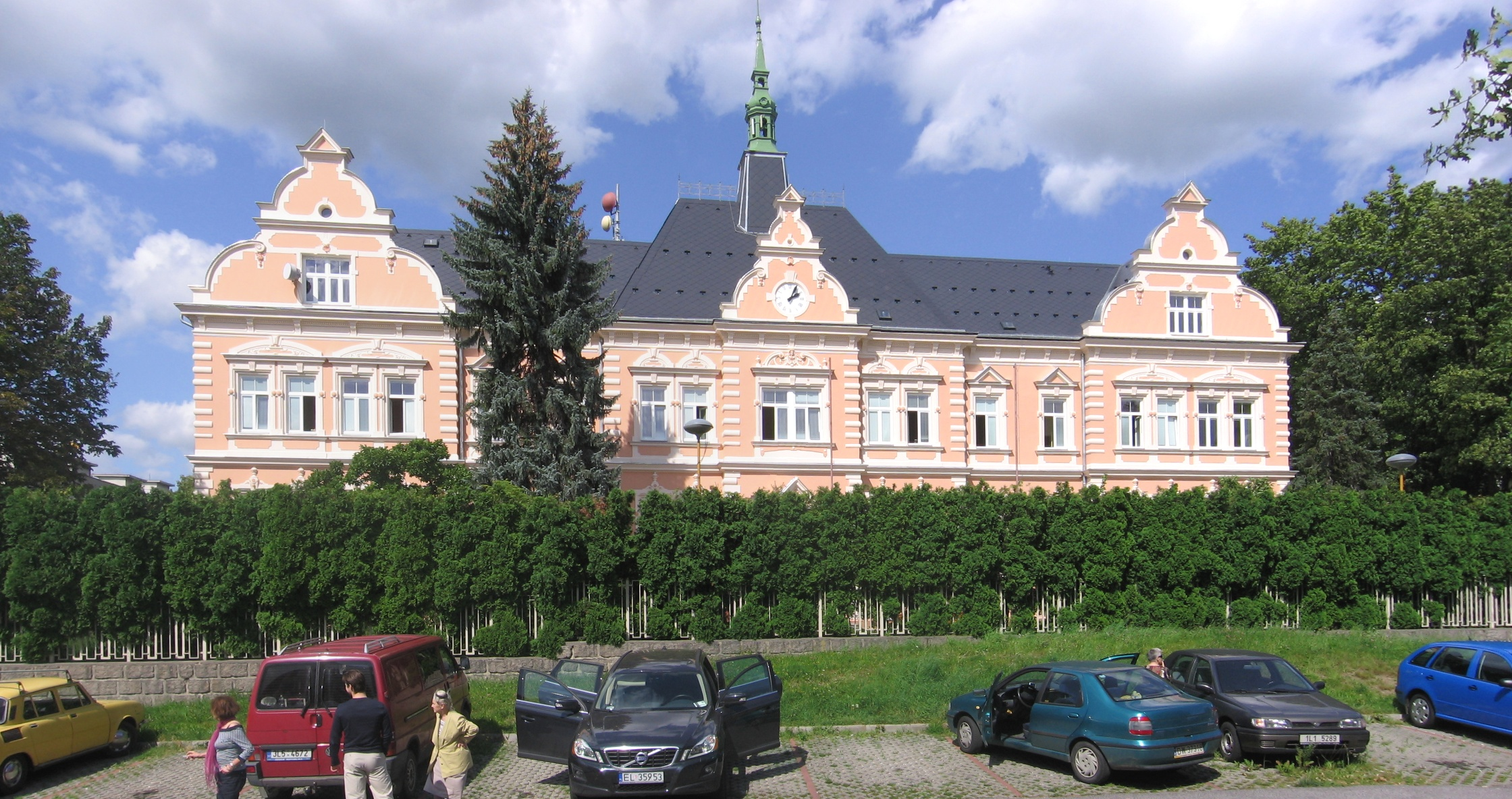 Frýdlant, szpital.